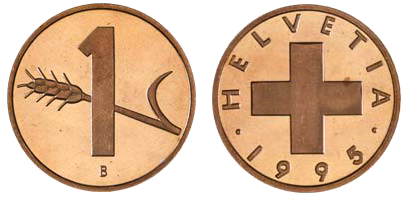 1 Ct 1995, image originale de SwissMint